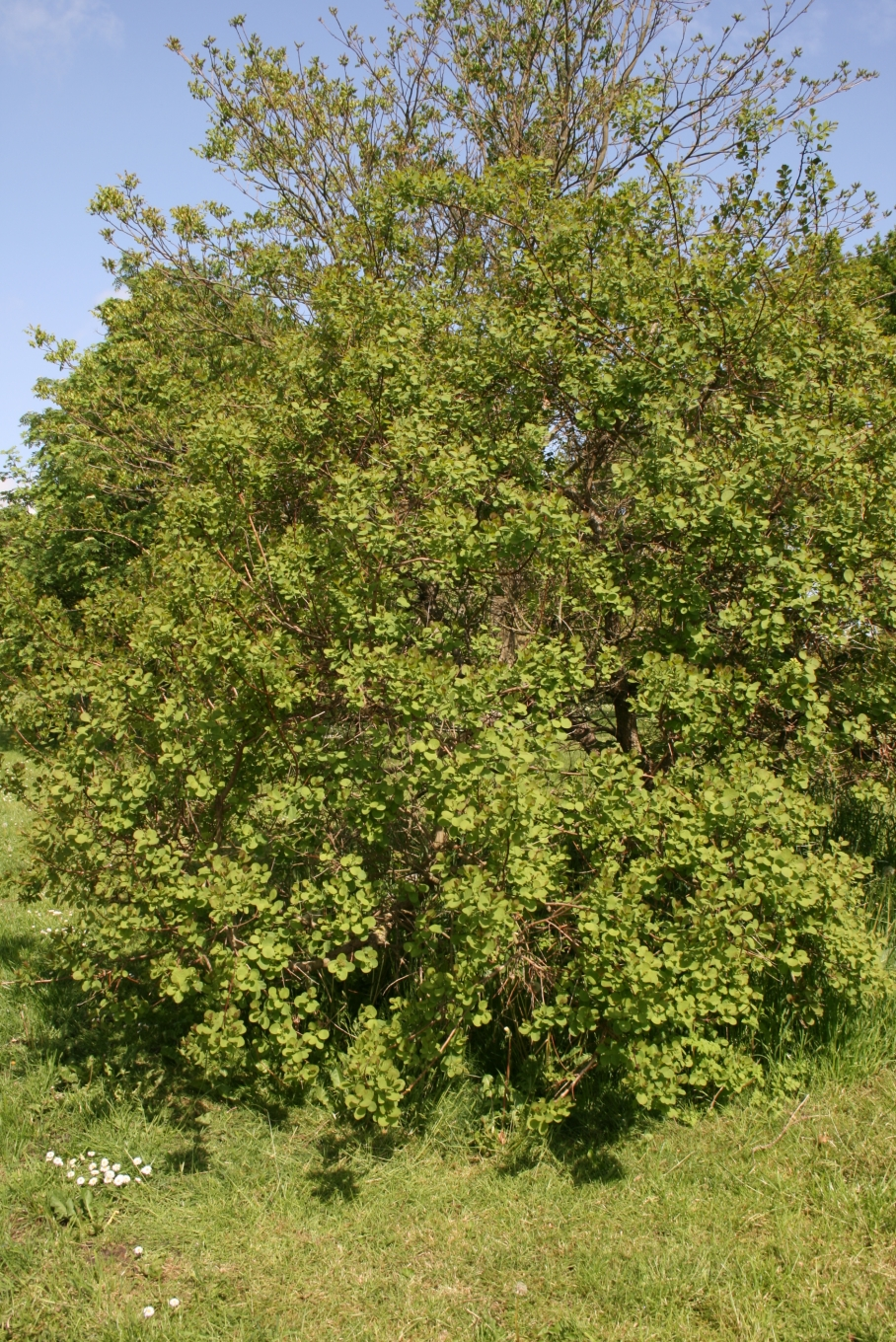 Cotinus obovatus: Habit